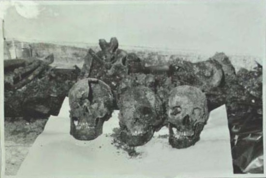 Deshumarea din Aleea Alexandru nr. 23, București, unul din cele trei cranii aparține comunistului Ștefan Foriș.